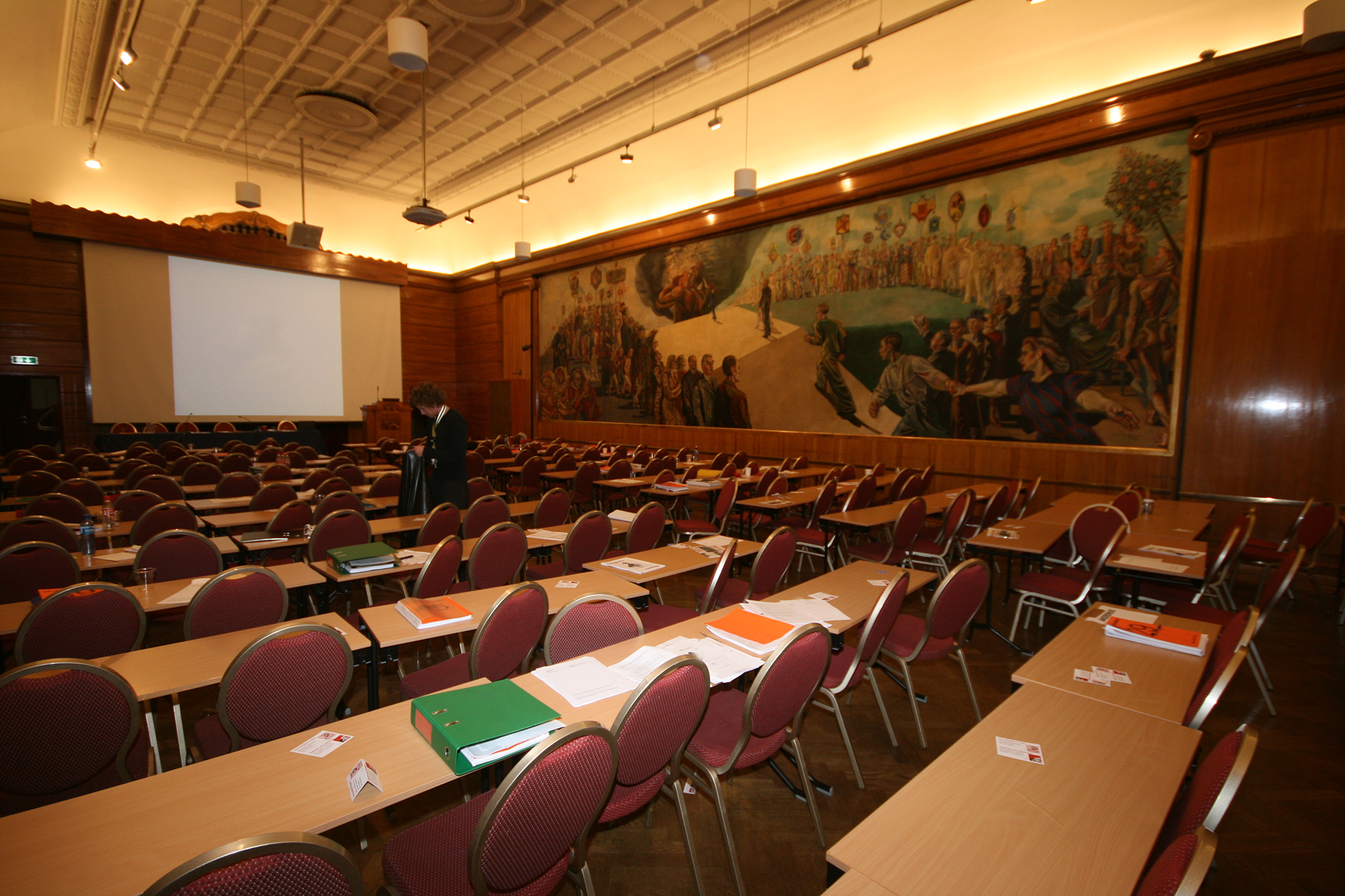 Festsalen i Håndverkeren, Rosenkrantz' gate 7 i Oslo. Veggen i bakgrunnen er dekorert av Per Krohg.